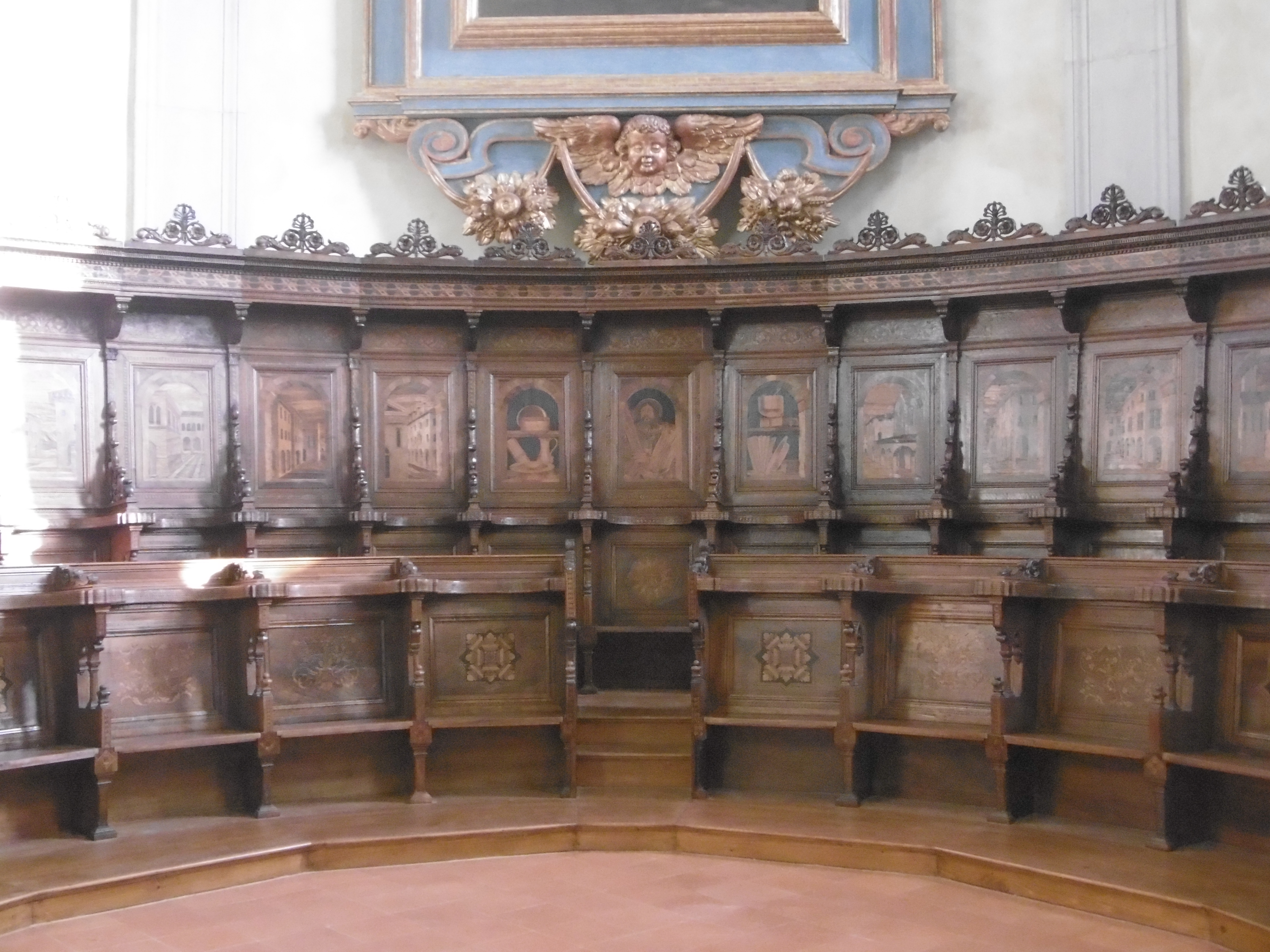 Il coro